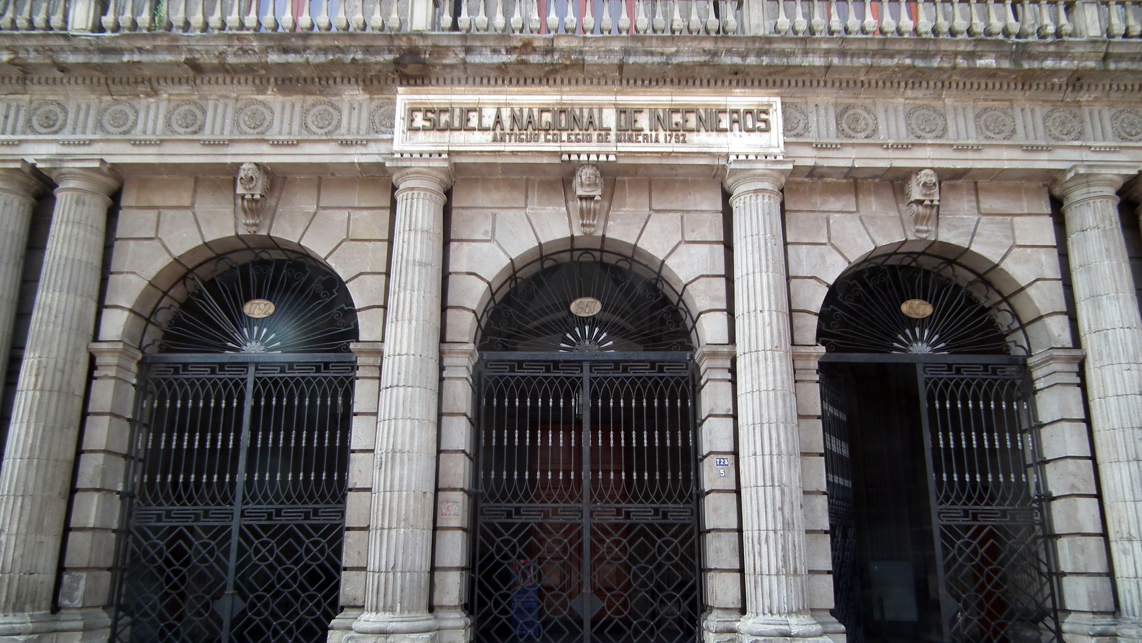 Detalle de la fachada principal mostrando la entrada central del edificio